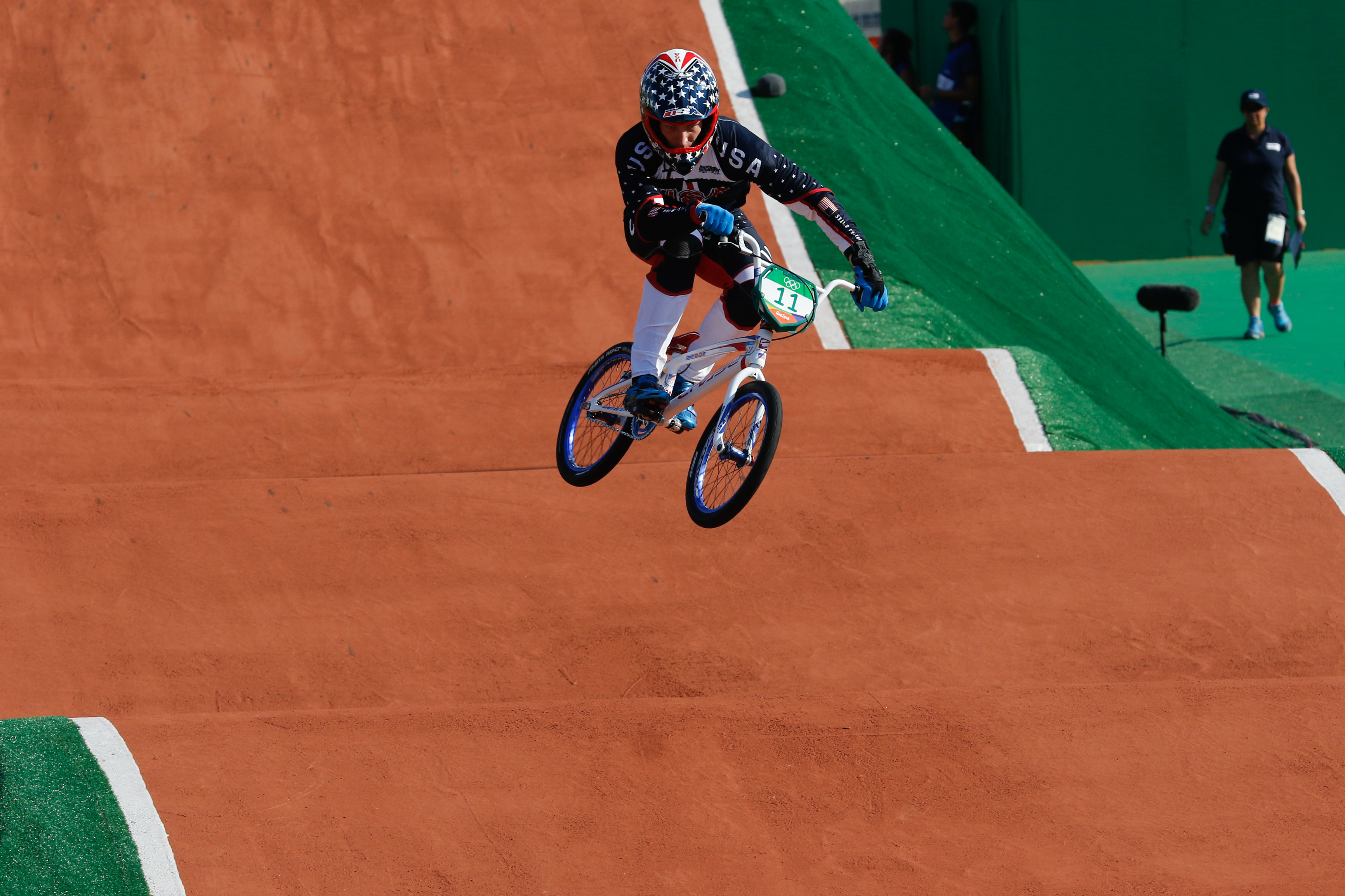 Rio de Janeiro - Ciclista norte-americano Connor Fields compete BMX nos Jogos Olímpicos Rio 2016, no Parque Radical em Deodoro (Fernando Frazão/Agência Brasil)